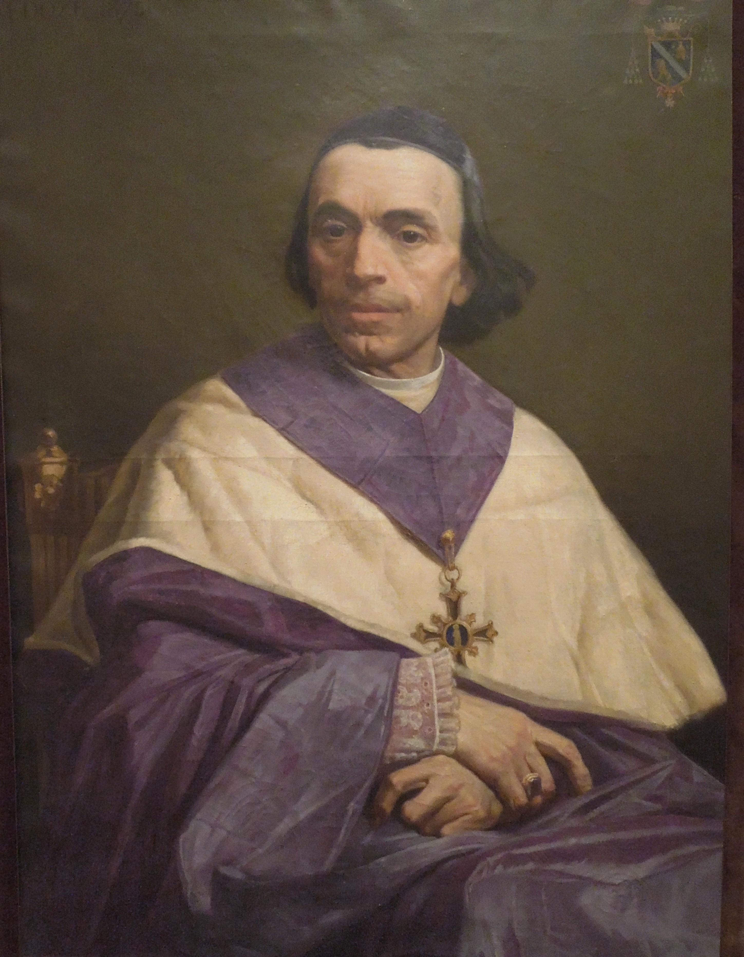 Nîmes (Gard, France), musée du Vieux Nîmes sis dans l'ancien palais épiscopal, portrait de monseigneur Claude-Henri Plantier (vers 1855 - 1860), évêque de Nîmes de 1855 à 1875, par Melchior Doze.